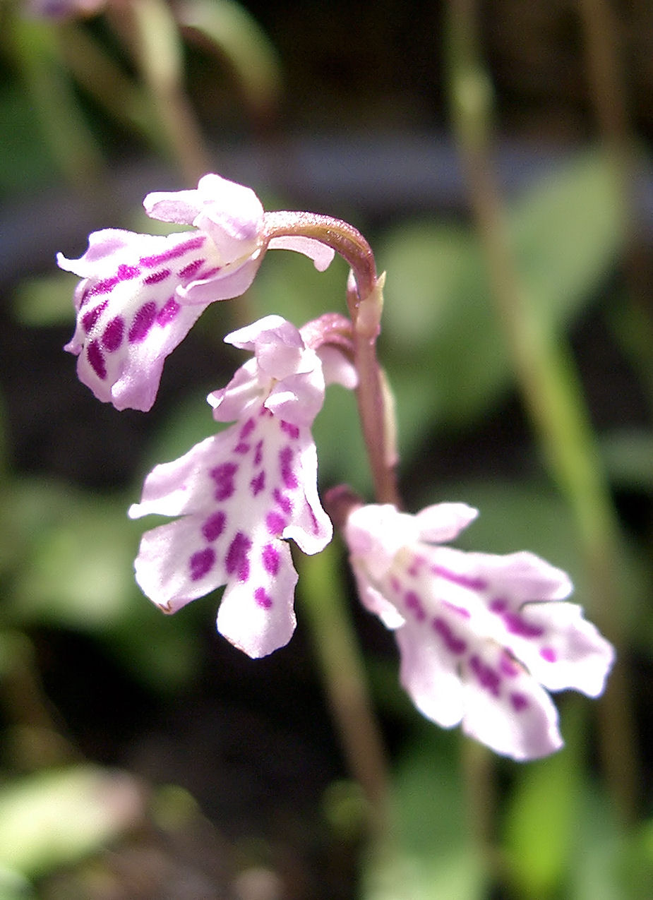 Scientific name Amitostigma lepidum